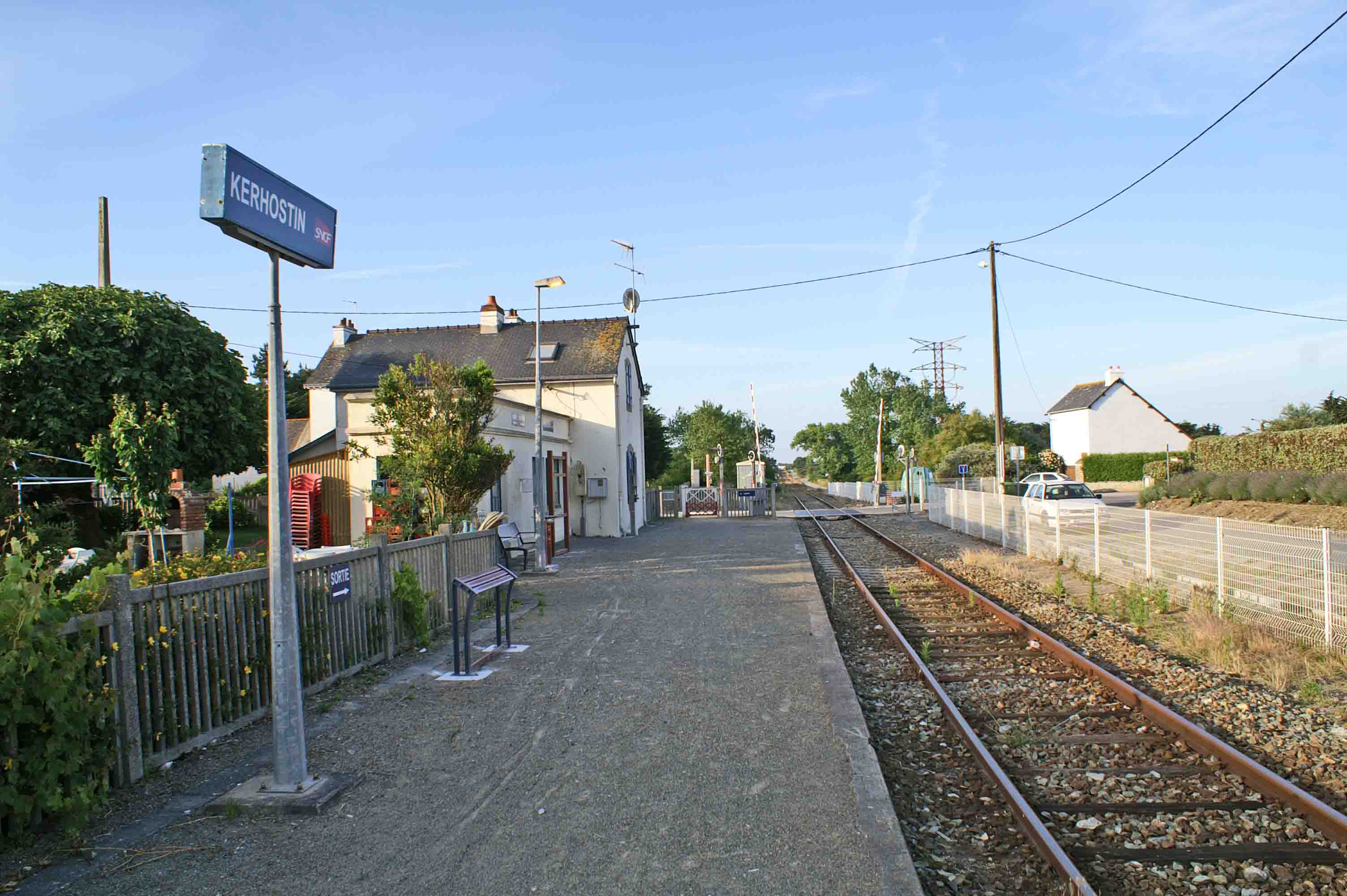 La gare de Kerhostin dans son ensemble.